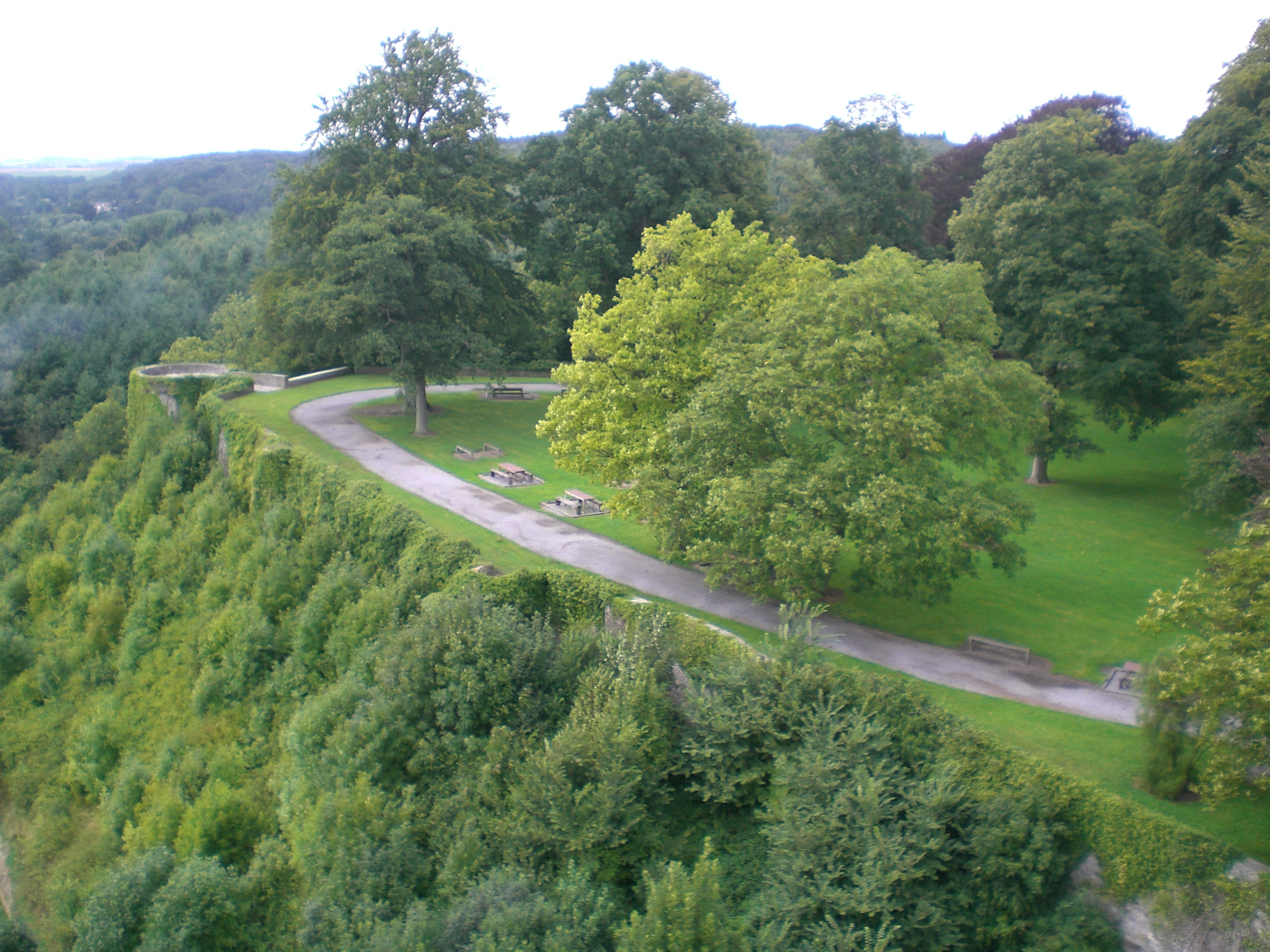 rempart de Beaumont (Hainaut) belgique